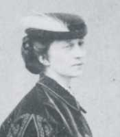 Antonina Dzieduszycka (Mazaraki)